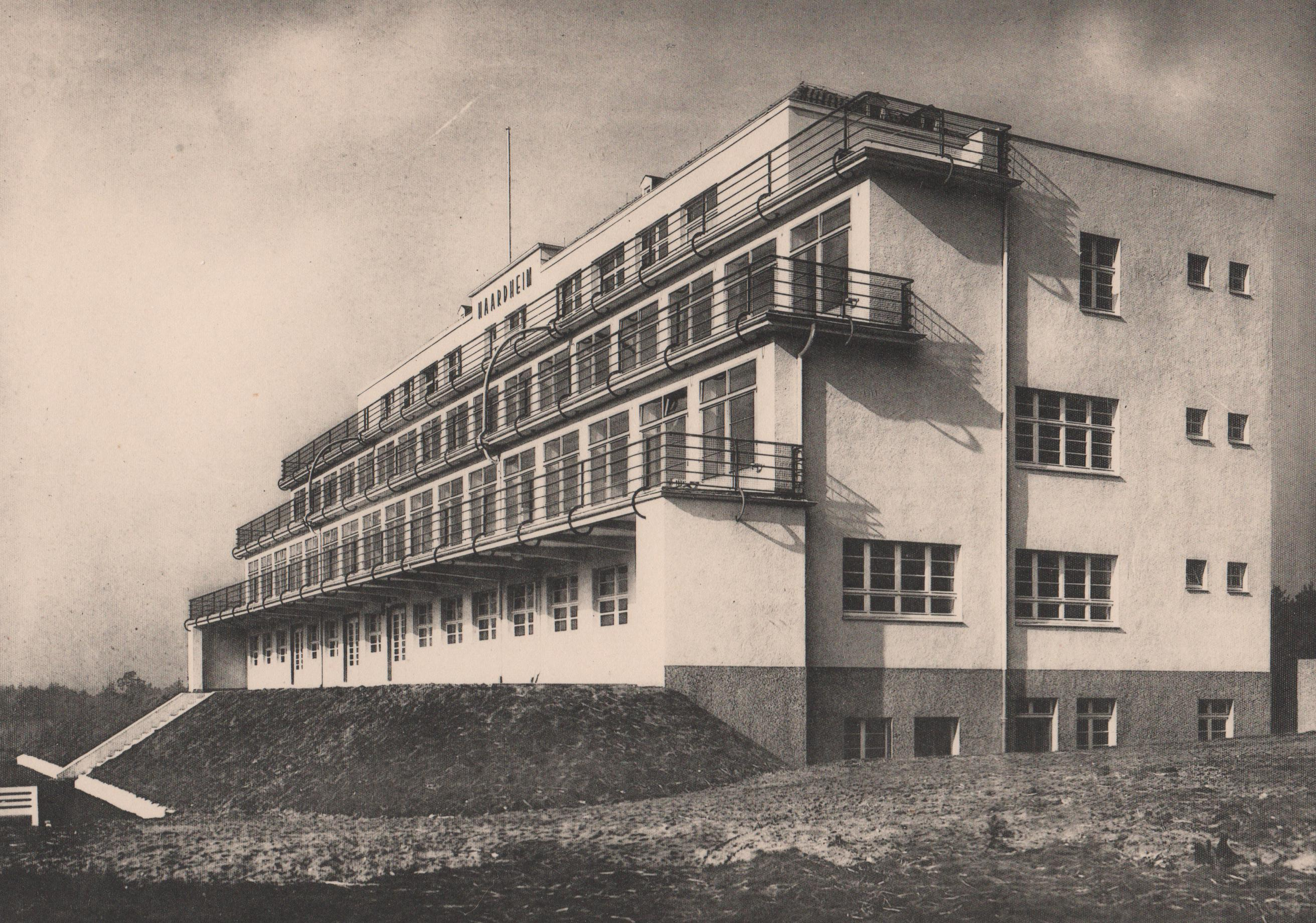 Tuberkulose-Heilstätte Haardheim in Marl (Nordrhein-Westfalen), Haltener Straße 575, erbaut 1927-1928